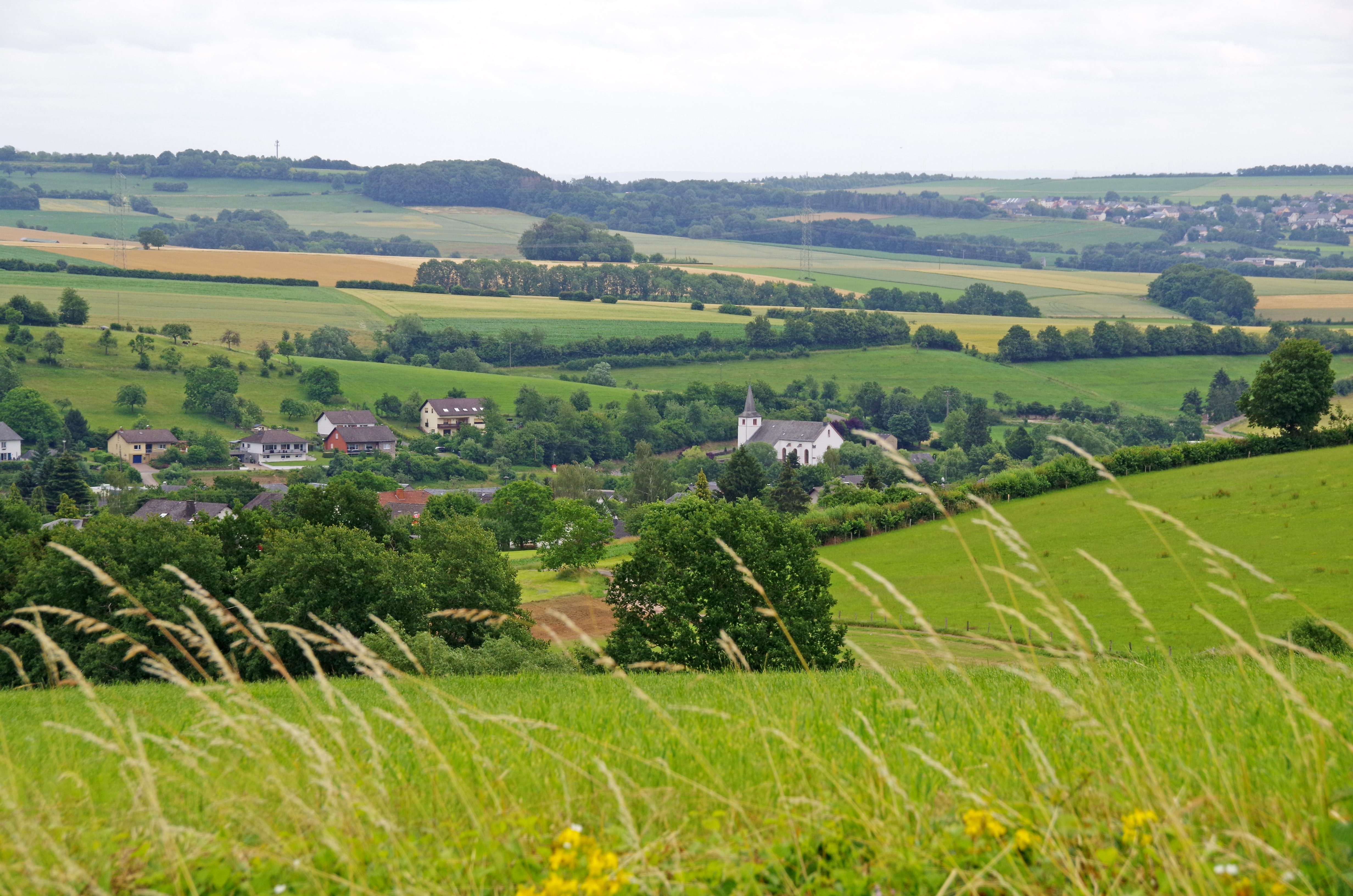 Ehlenz